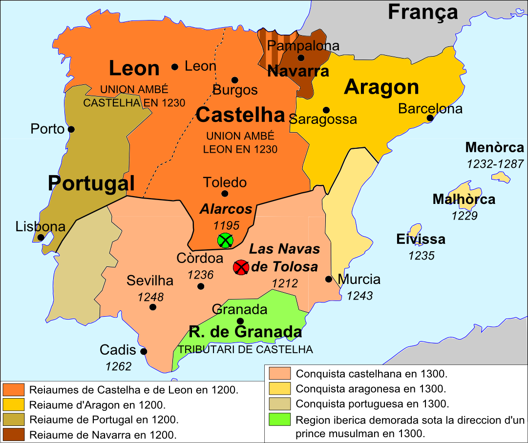 Debanament de la Reconquista dins lo corrent dau sègle XIII.